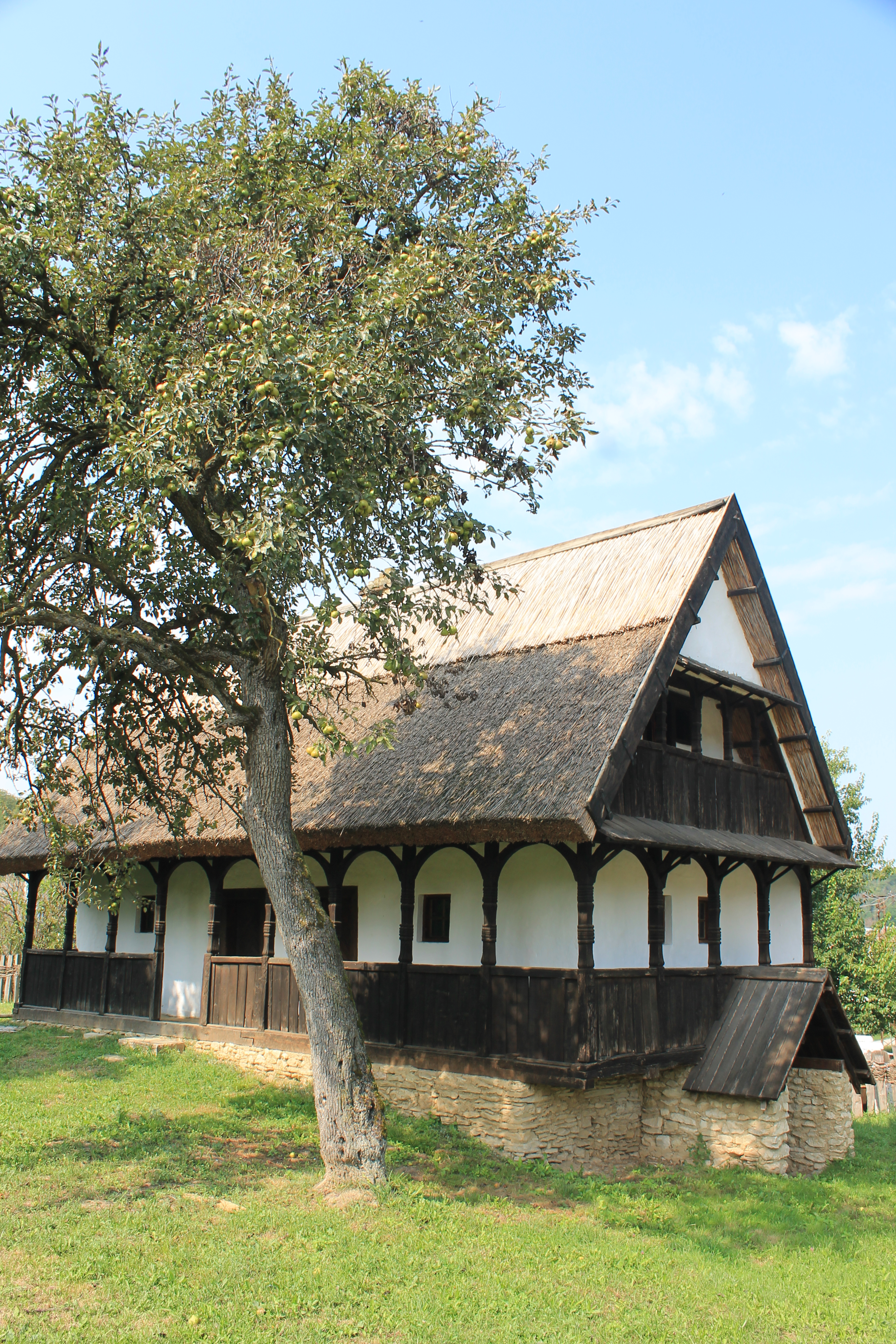 Seoska kuća u Neštinu